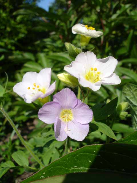 Polemonium carneum